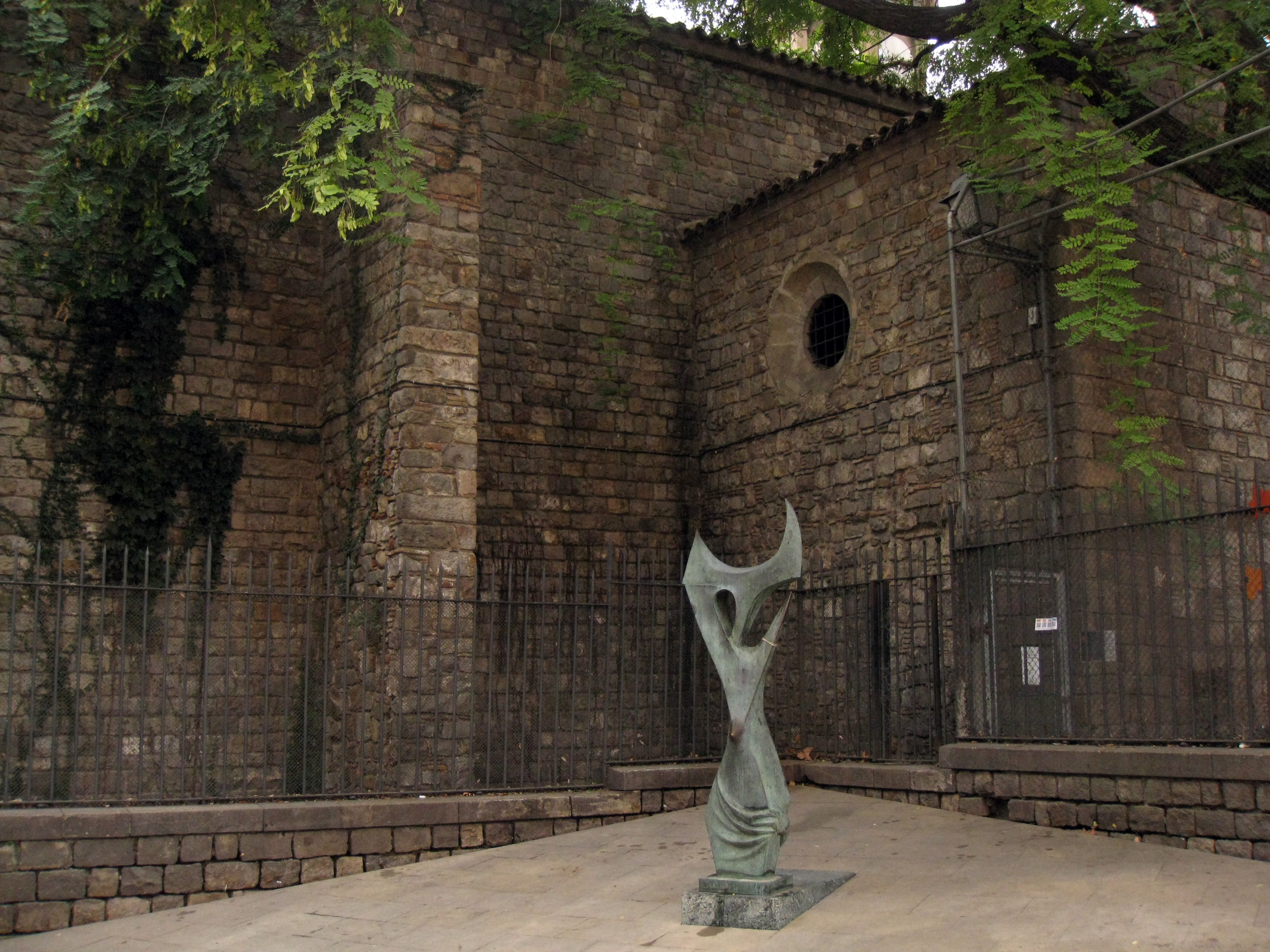 Antic Hospital de la Santa Creu (Barcelona).